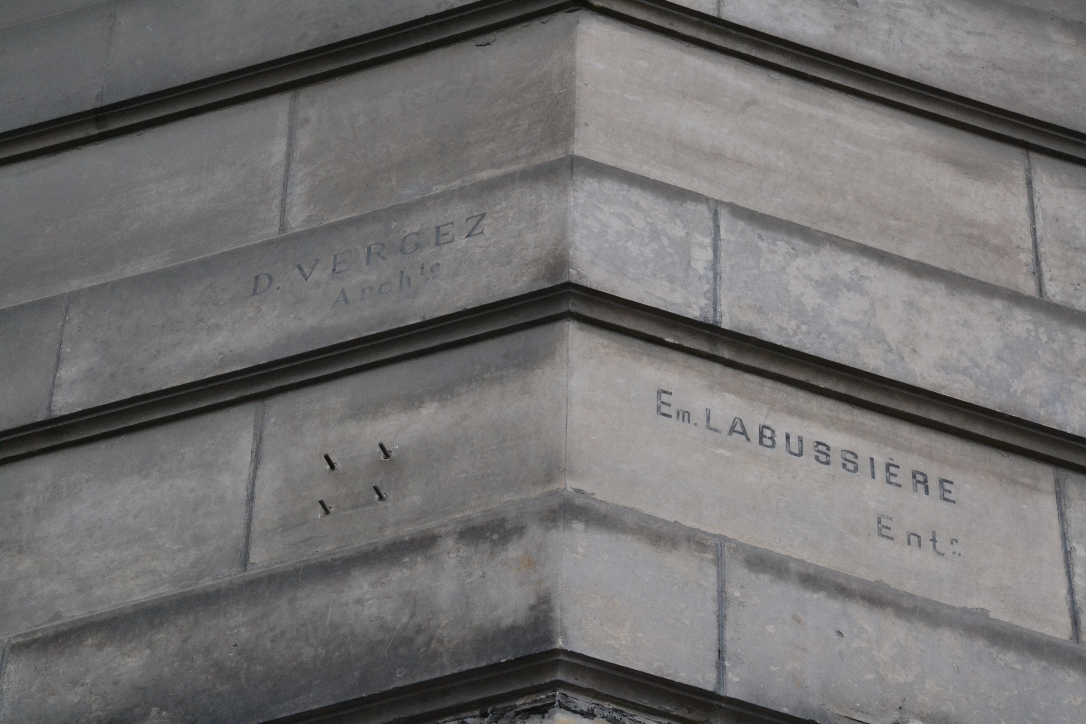 Épigraphe de l'entrepreneur et maire de Limoges Emile Labussière, dans une rue de Limoges (Haute-Vienne, France).